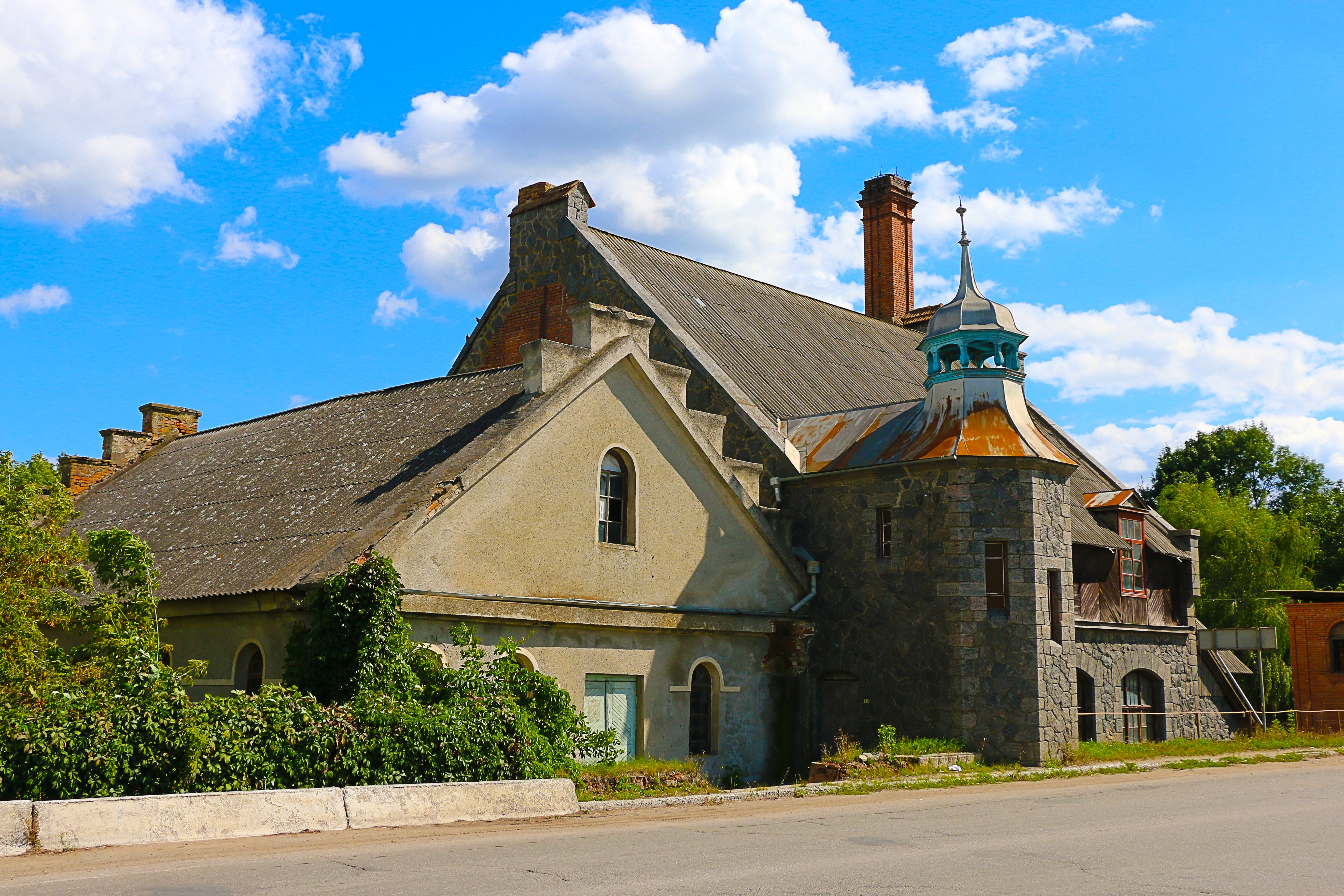 Електростанція та млин, Немирів, вул. Горького 26